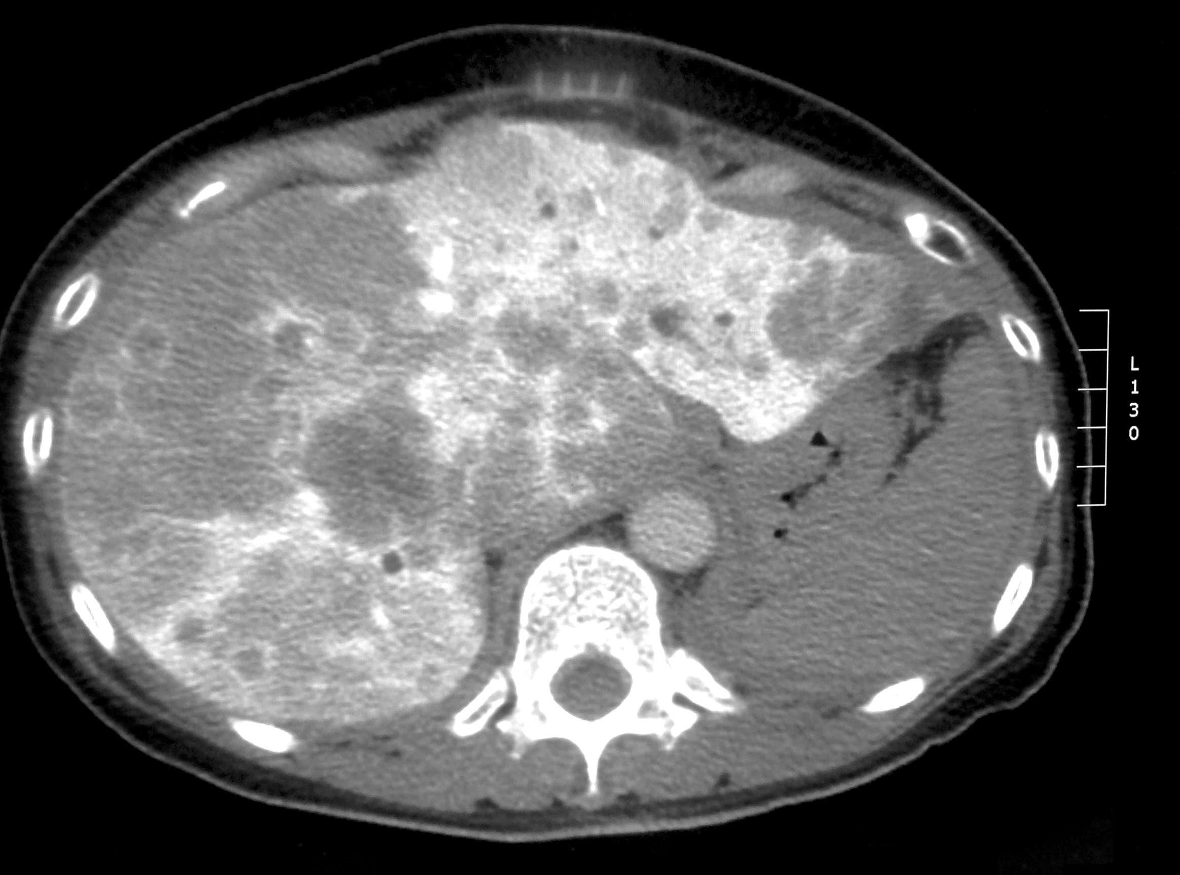 大腸癌經常經由肝門靜脈轉移至肝臟，在肝臟造成極大的傷害，最後嚴重威脅罹癌病患的生命。